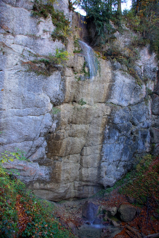 Osterdorfer Wasserfall